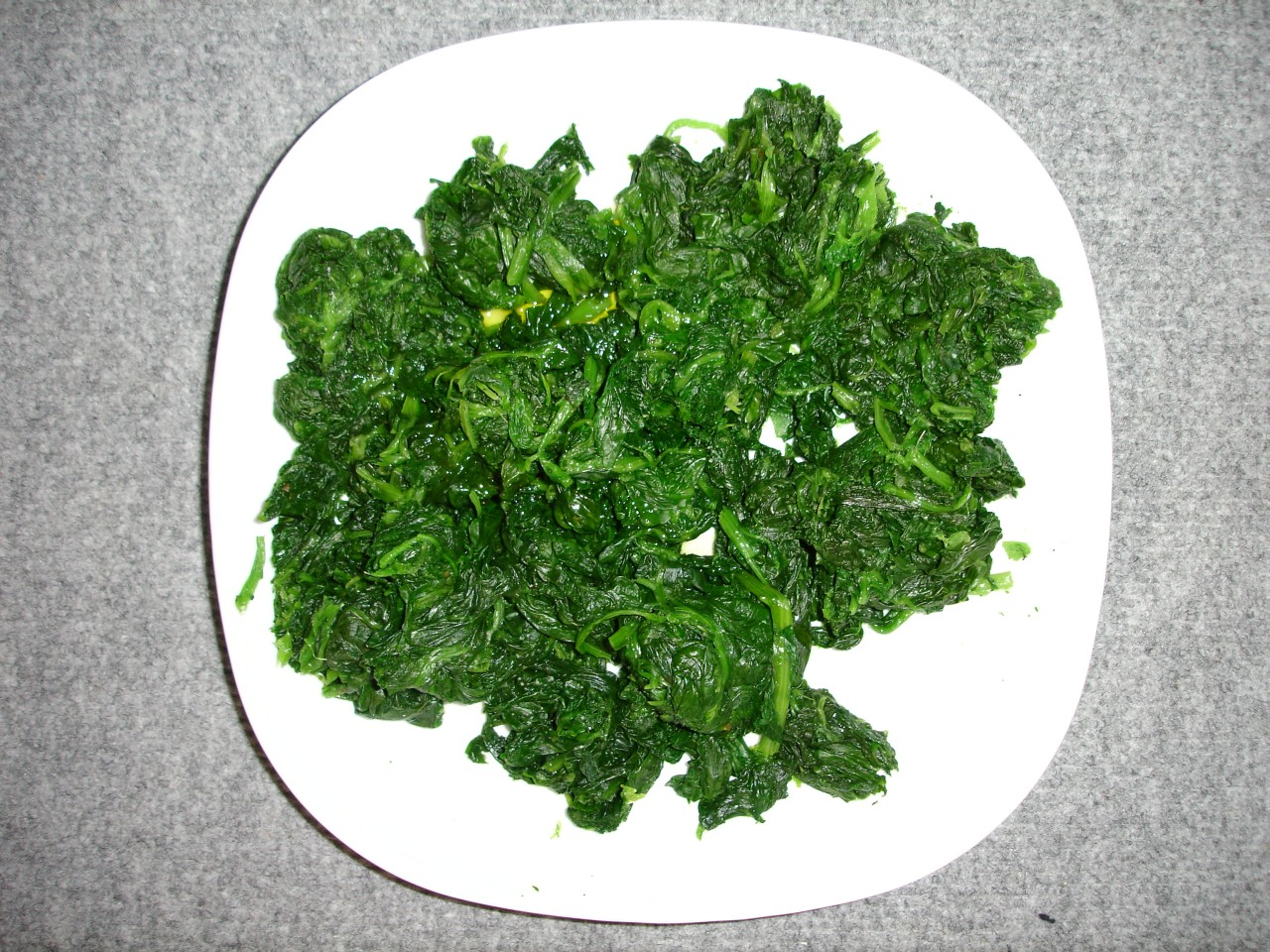 Boiled spinach in a plate / épinard cuit et présenté dans une assiette